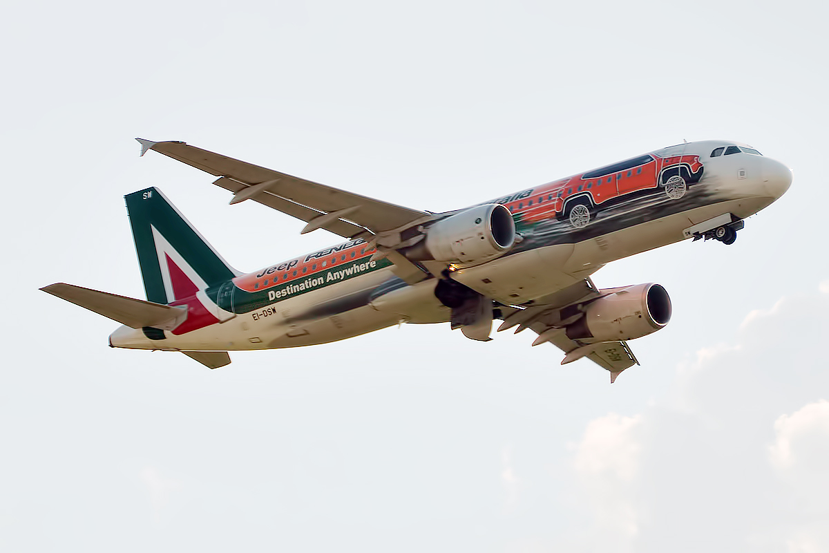 Alitalia (Jeep Renegade Livery), EI-DSW, Airbus A320-216